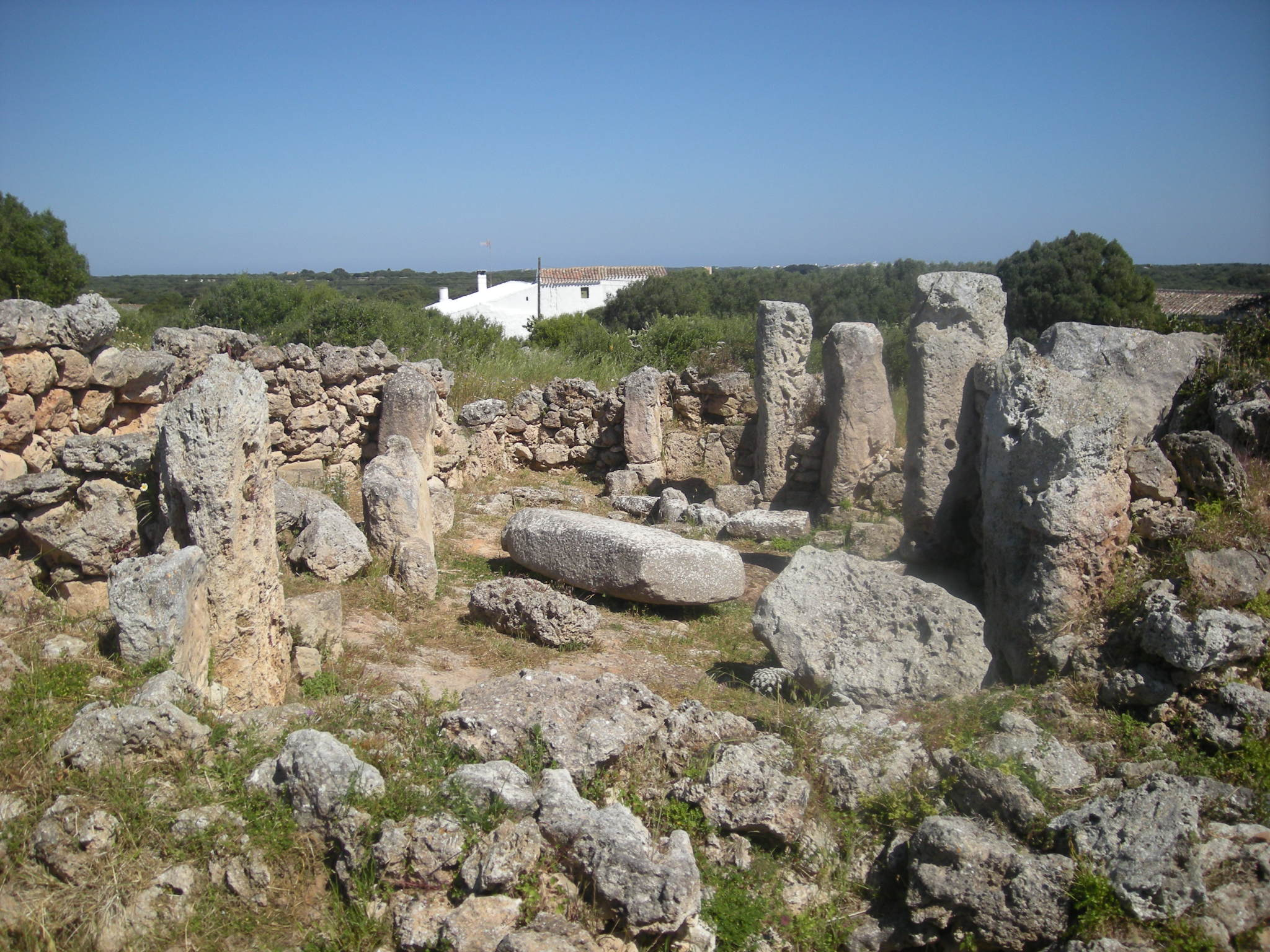 So na Caçana